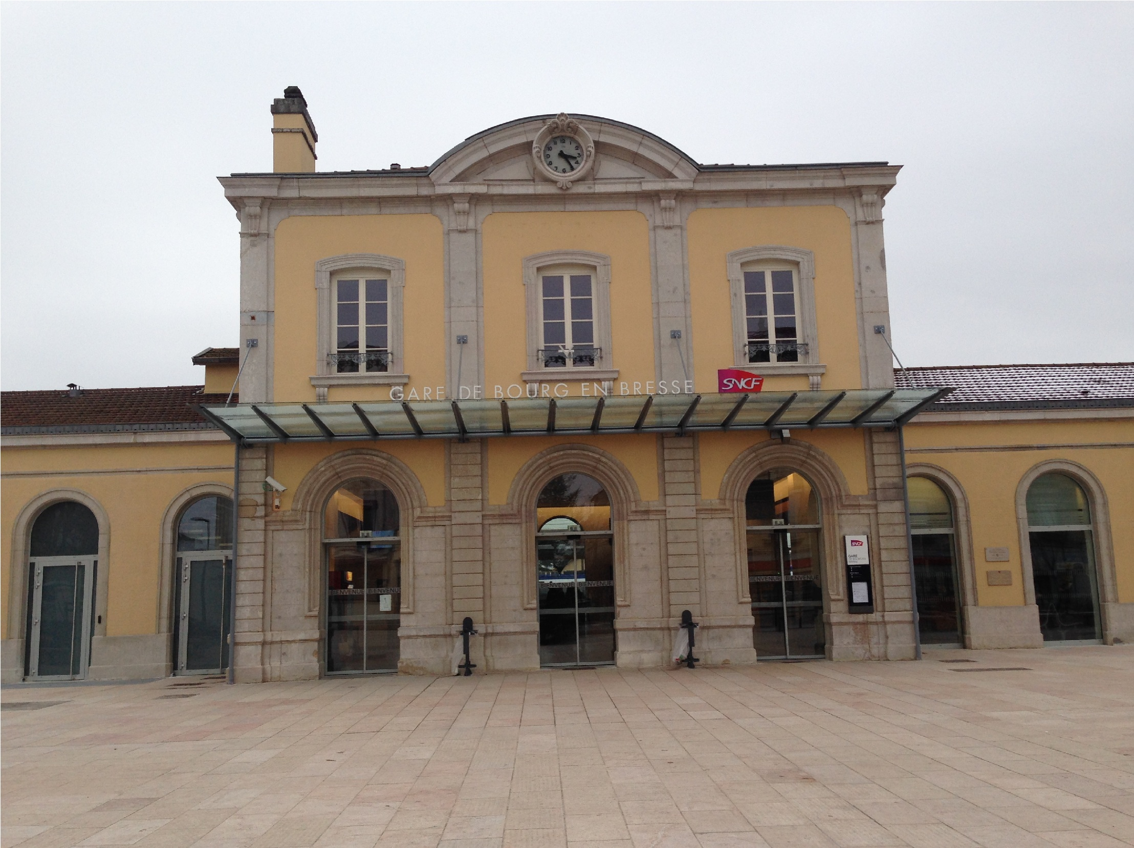 布昂佩斯站（布雷斯地区布尔格站）（Gare de Bourg-en-Bresse）